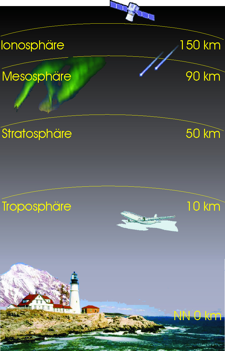 Aufbau der Atmosphäre der Erde